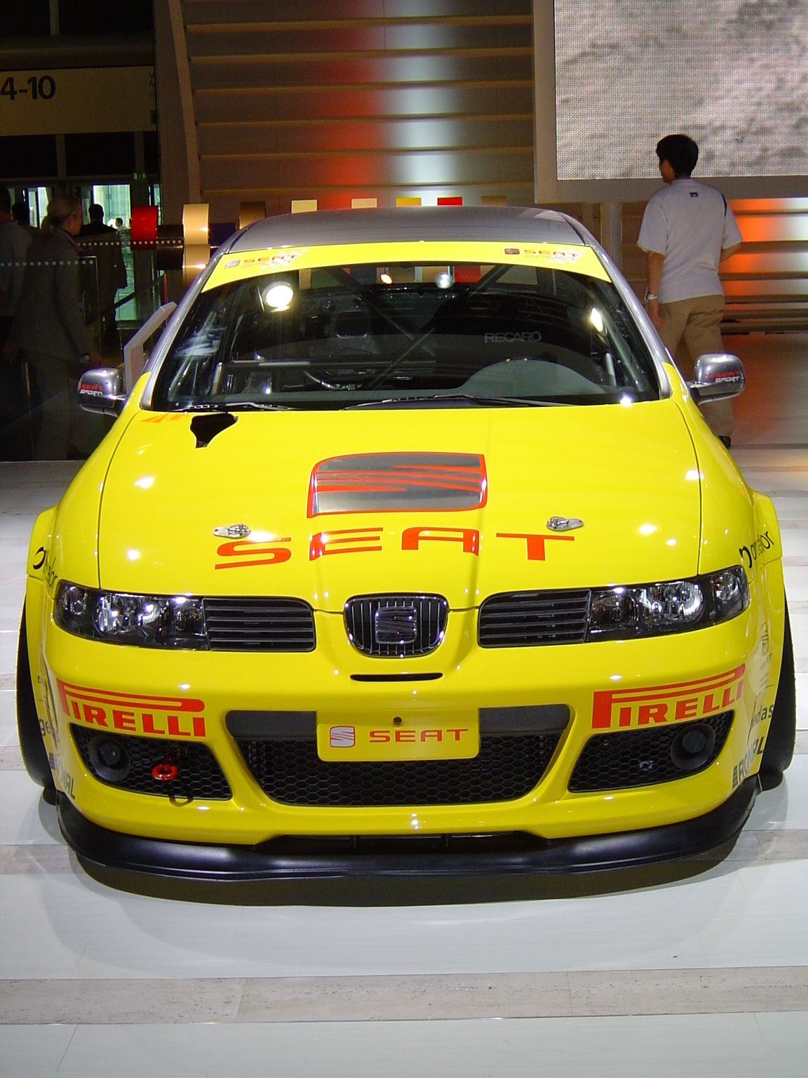 IAA_2003_098